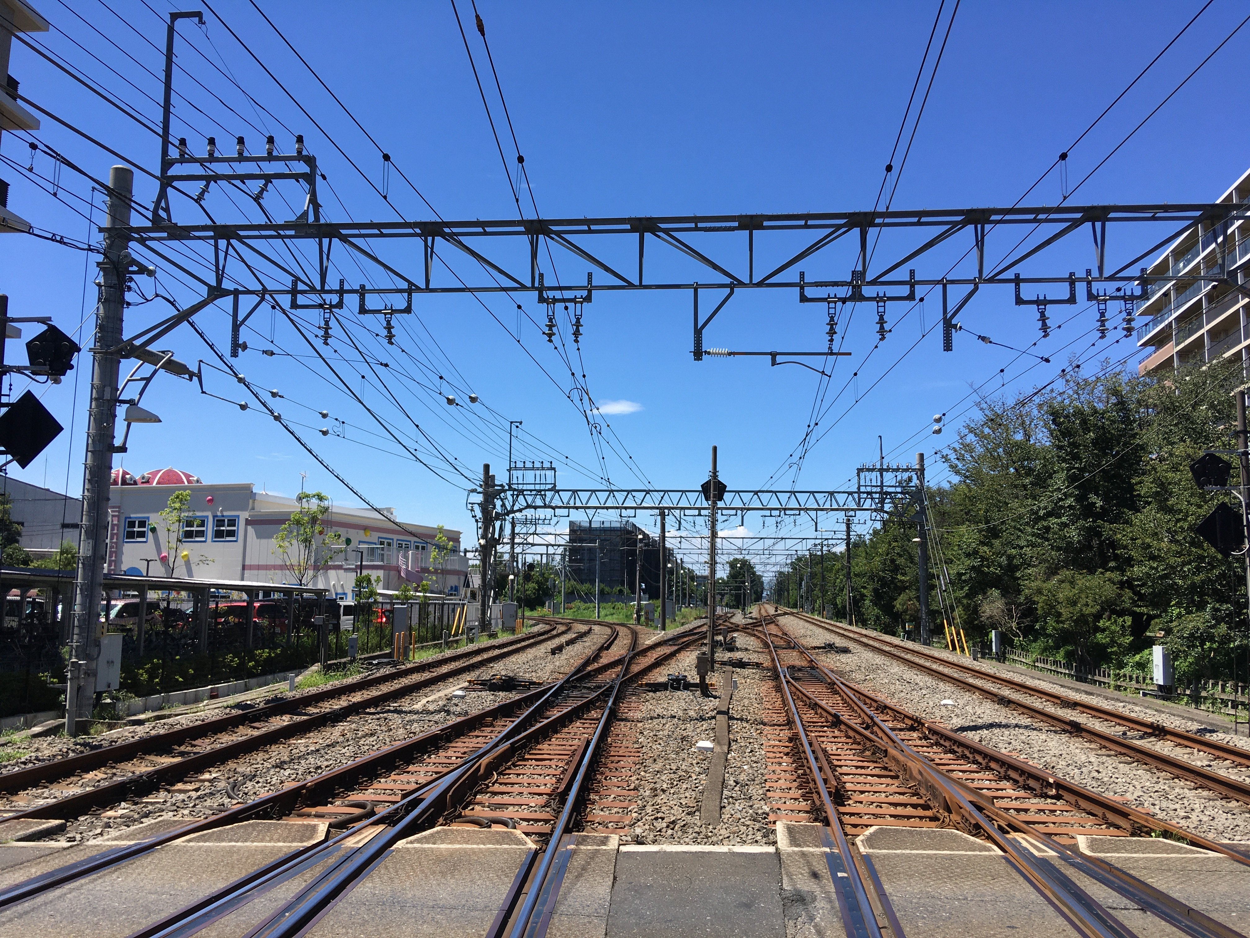 小川、及び八坂方の踏切構内より撮影